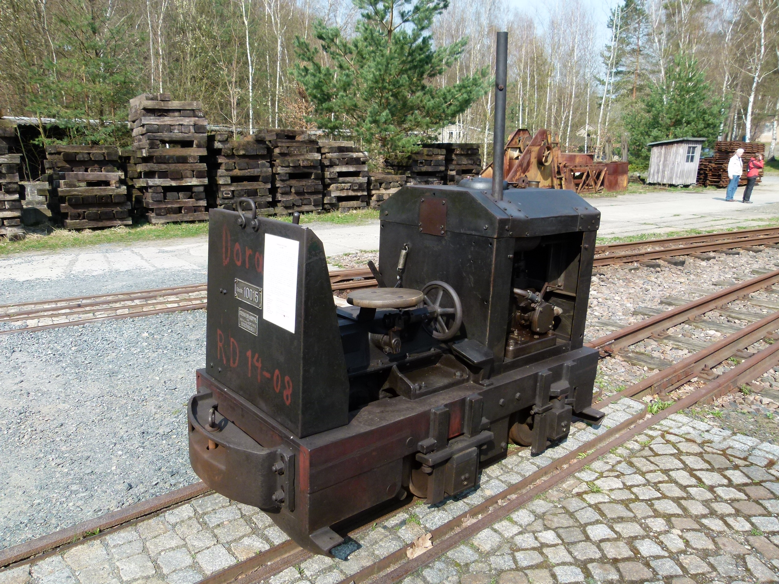 Lokomotive der Orenstein & Koppel AG (Nordhausen), Typ MD 1, 11 PS, Baujahr 1939, Feldbahnmuseum Herrenleite, bei Pirna / Dresden, Sachsen